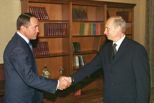 НОВО-ОГАРЕВО. Путин с Министром по делам печати, телерадиовещания и средств массовых коммуникаций Михаилом Лесиным.